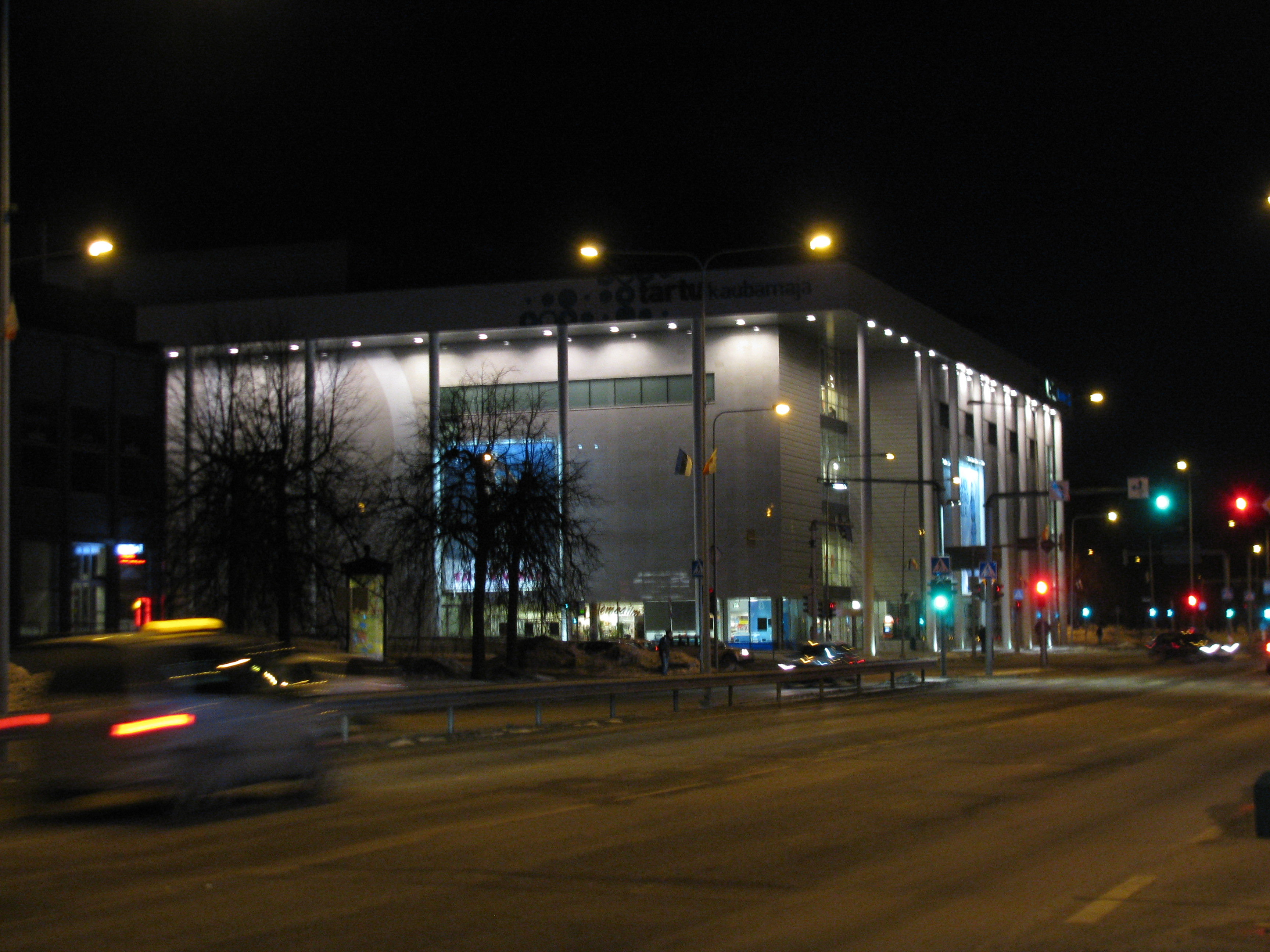 Tartu Kaubamaja õhtul tuledes